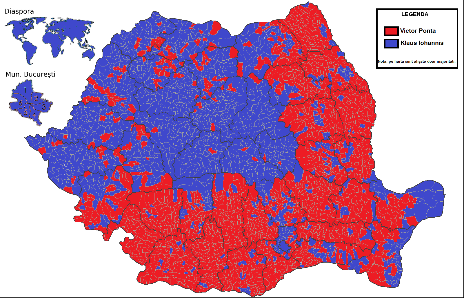 Harta alegerilor prezidențiale din Romania 2014 cu rezultatele turul 2